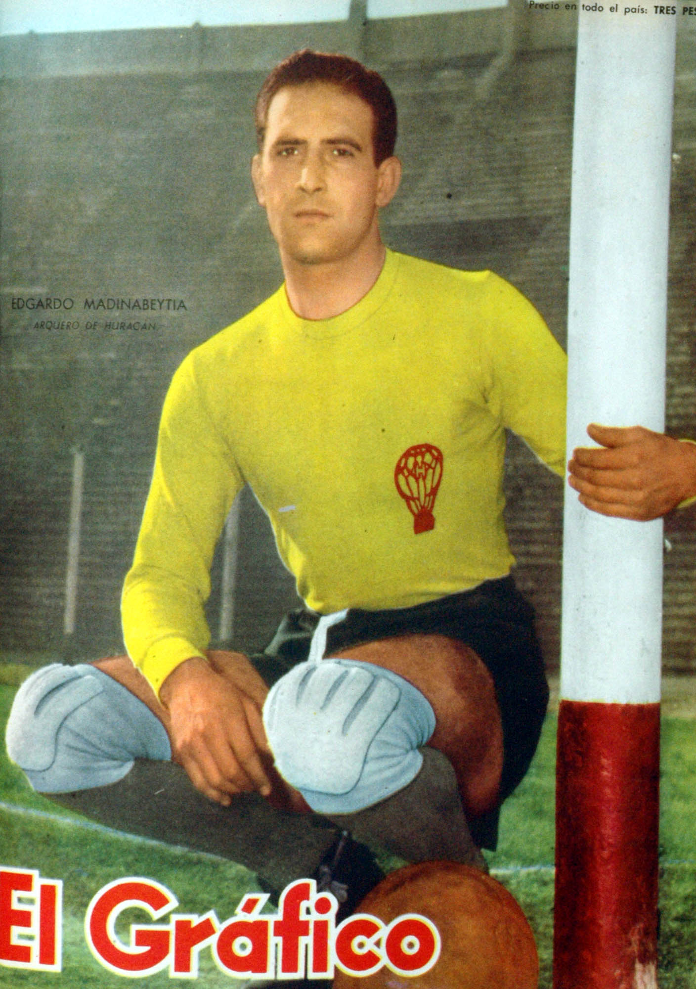 El Grafico del 16 de Agosto de 1957. Edicion 1979